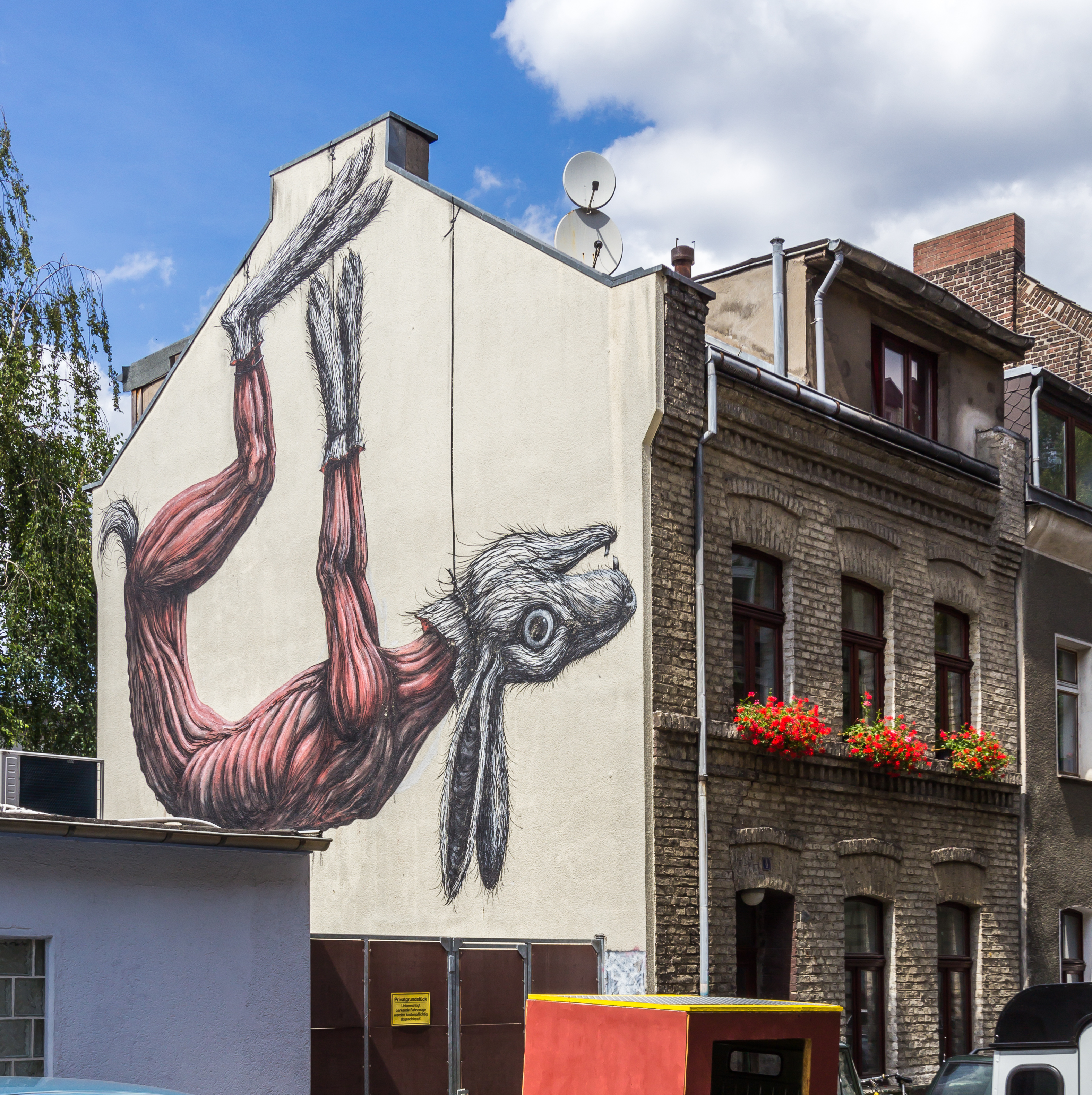 Wandgemälde an der Brandmauer des denkmalgeschützten Hauses Senefelderstraße 4, Köln-Ehrenfeld This is a photograph of an architectural monument.